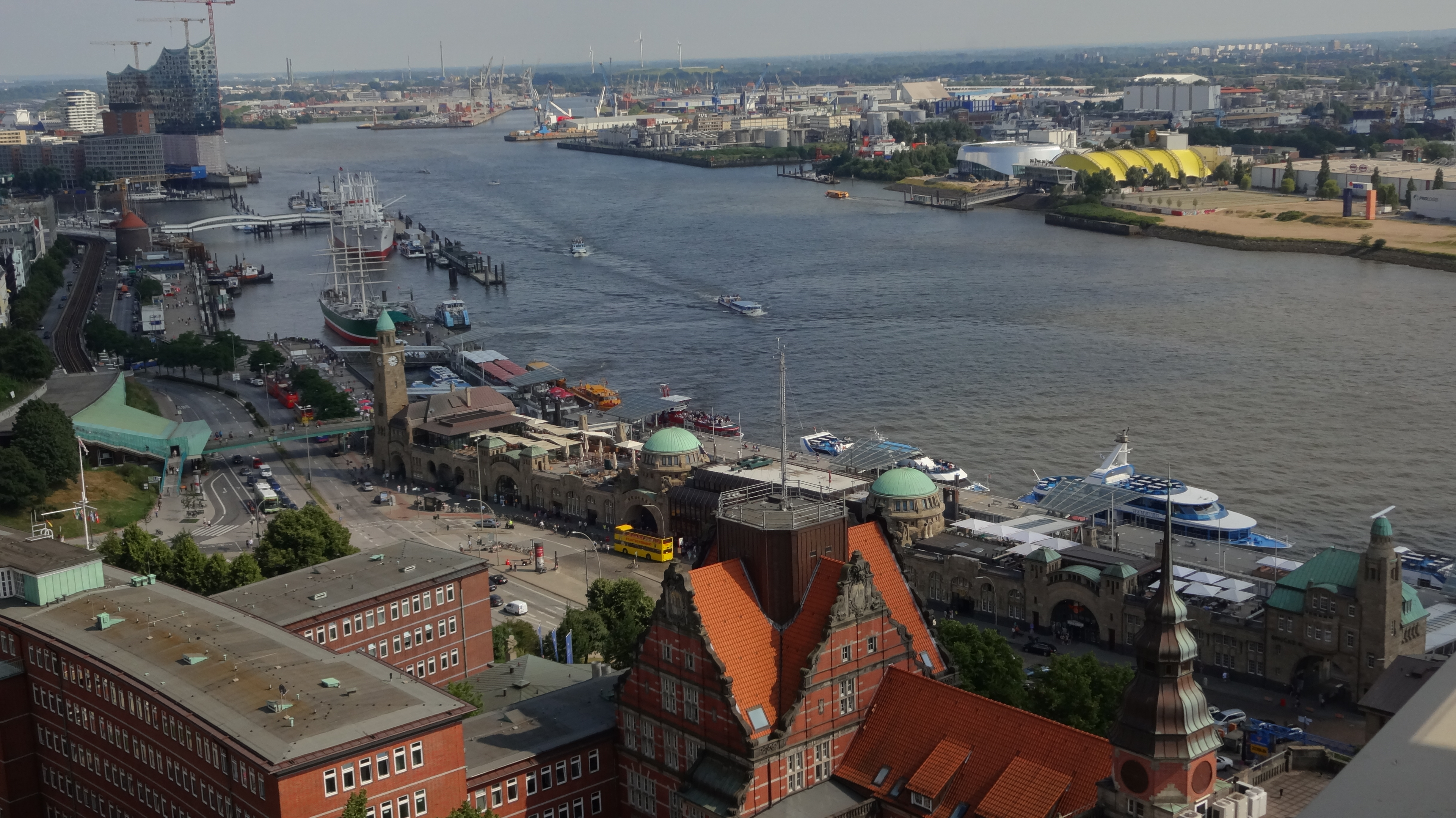 St. Pauli Landungsbrücken mit Elbphilharmonie (links oben) sowie "König der Löwen" Musicaltheater (gelb, rechts oben) und links daneben "Wunder von Bern" Musicaltheater mit silbrig glänzendem Dach. Der grün-rote Dreimaster ist die Rickmer Rickmers, schräg rechts dahinter in grau das Museumsschiff Cap San Diego. Fotografiert von der Dachetage des neuen Astraturmes